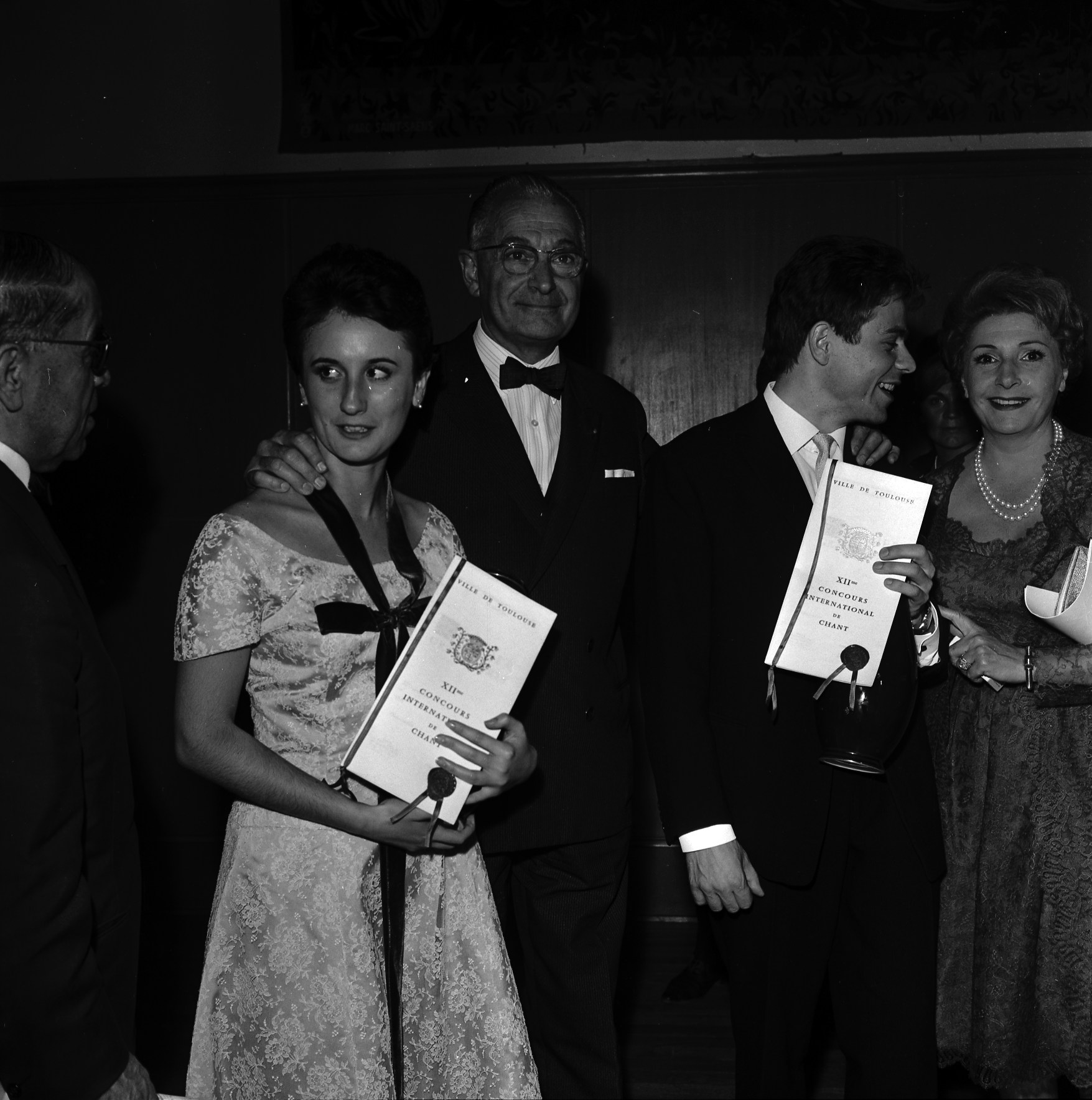 Théâtre du Capitole. Le 3 Octobre 1965. Vue d'un groupe de personnes pour le 12e concours international de chant au théâtre du Capitole.